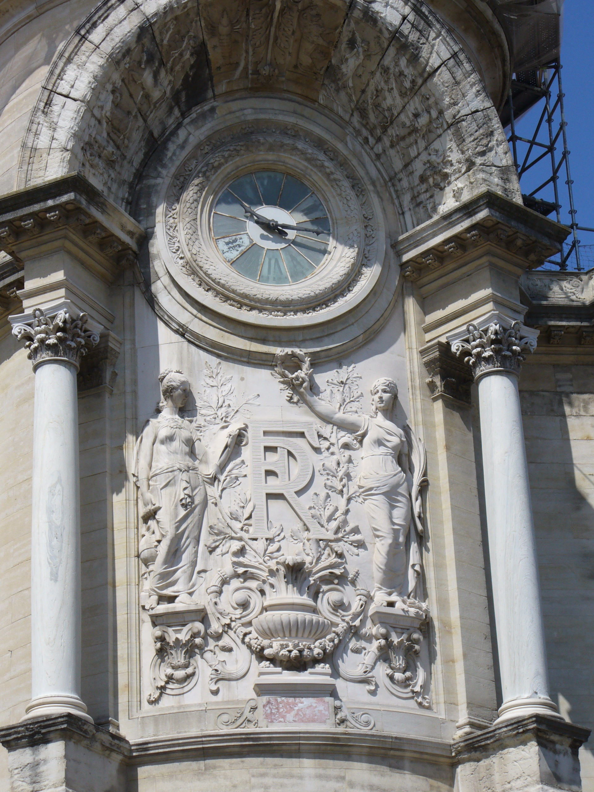 Nimes Geburtshaus Gymnasium Lycee Alphonse Daudet